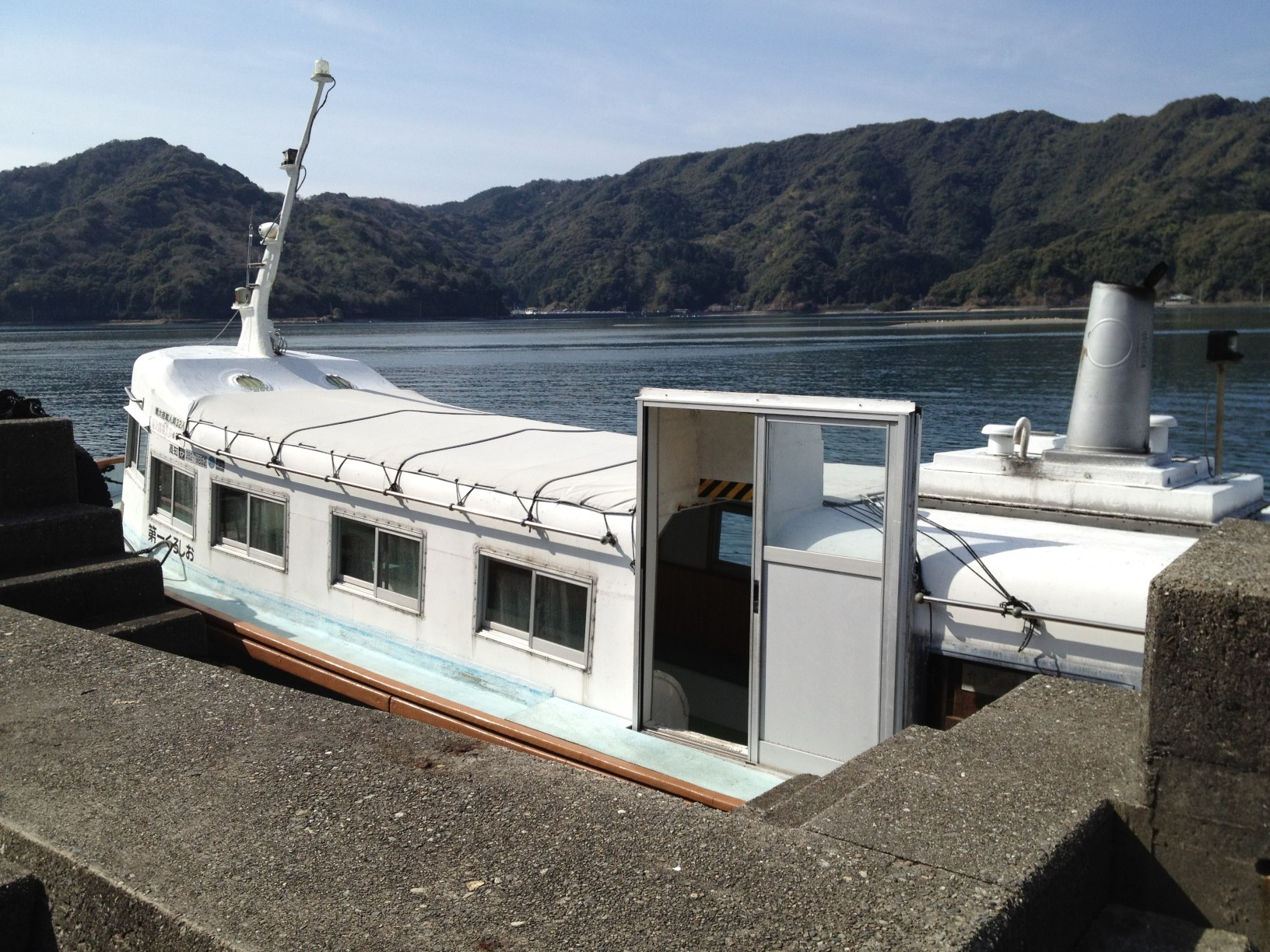 須崎市営浦ノ内湾巡航船。埋立。